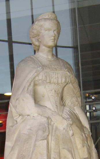 Statue der Kaiserin Elisabeth in der Halle des Wiener Westbahnhofs aus dem Jahr 1860; Bildhauer: Hans Gasser